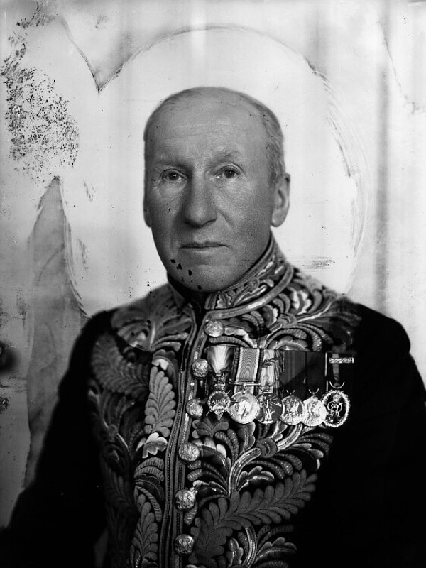 Lord Bayford